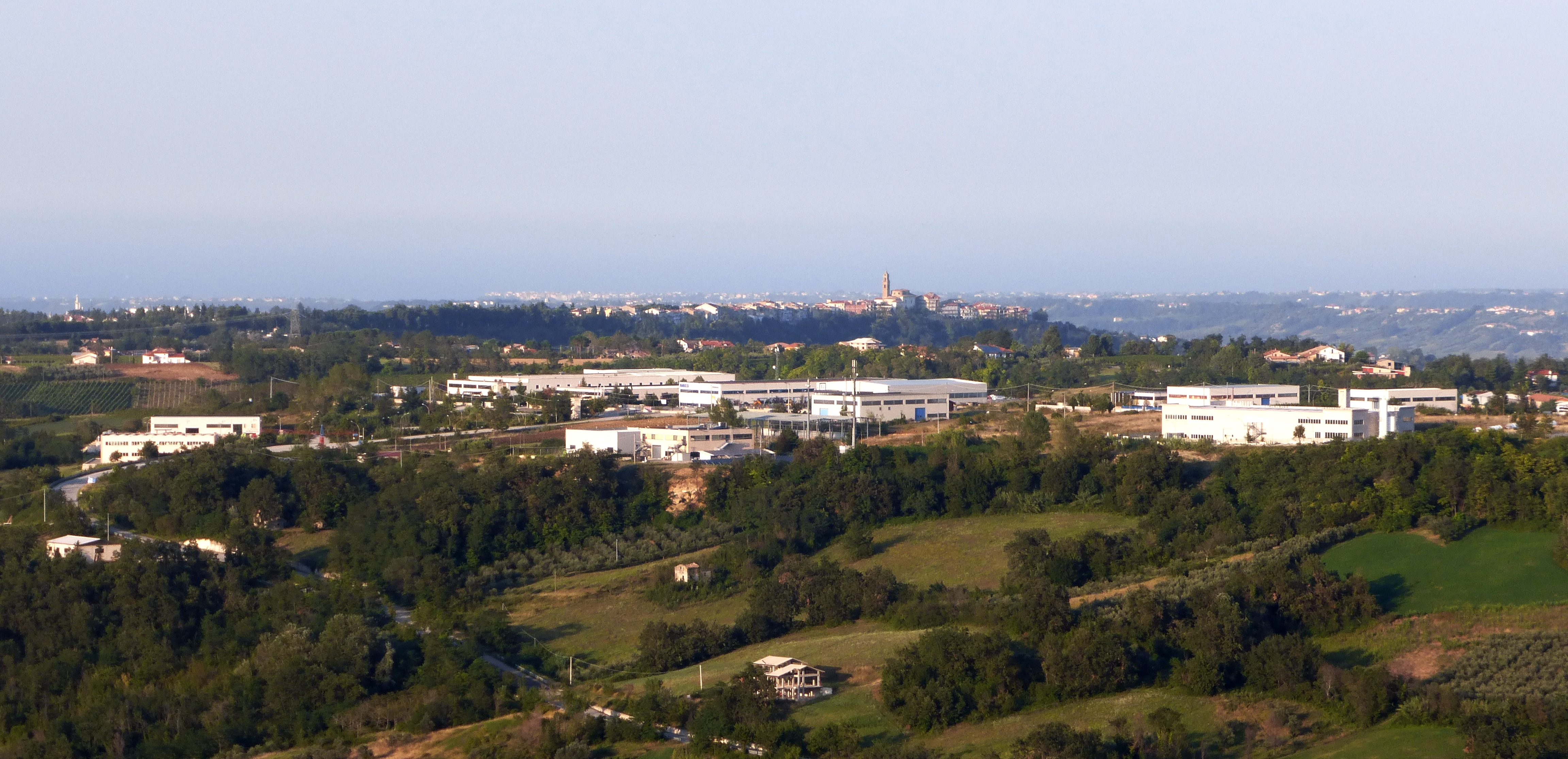 Zona Industriale Piano Venne, Guardiagrele, Chieti.